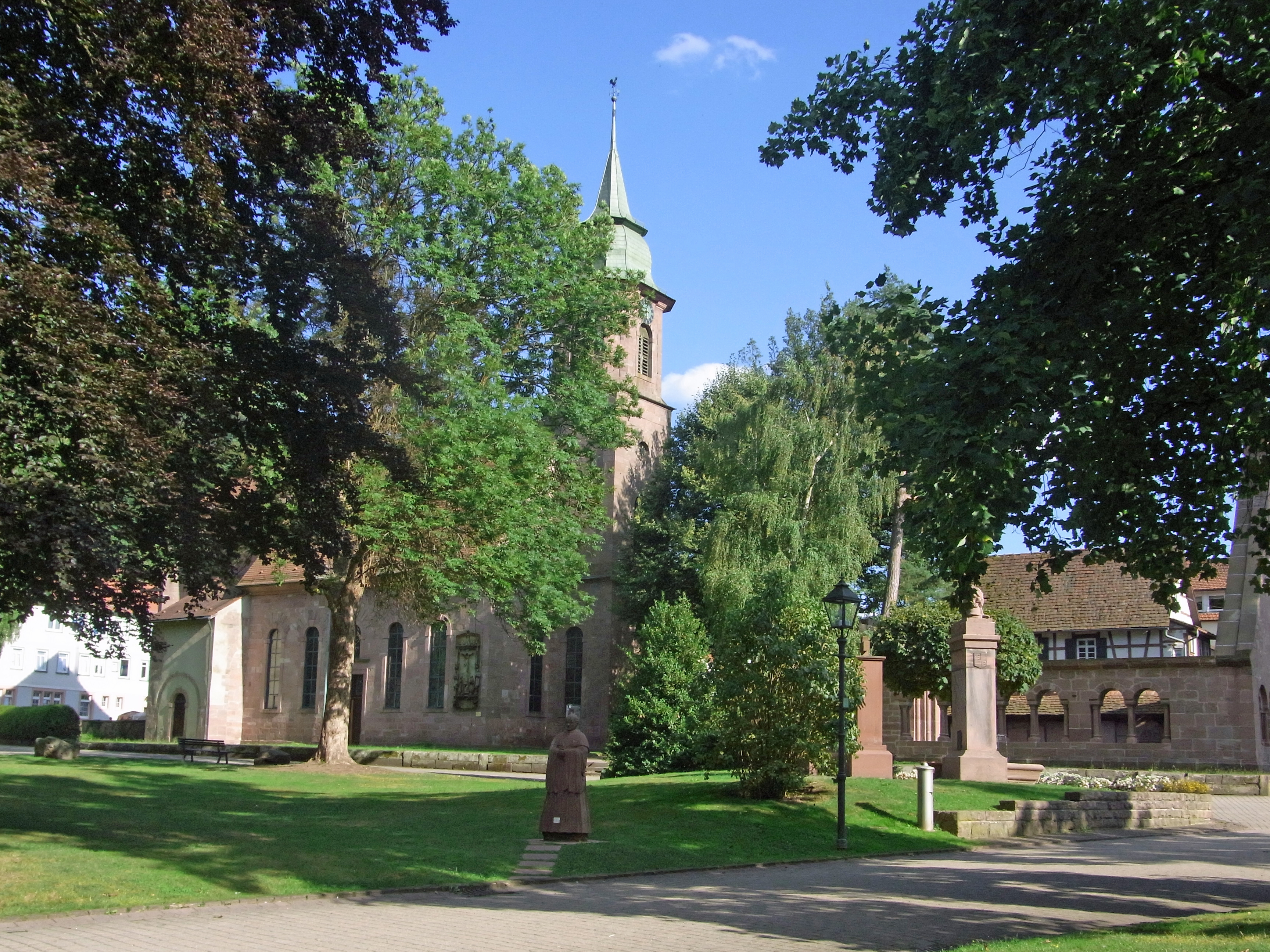 Kloster Herrrenalb: Blick zur Klosterkirche